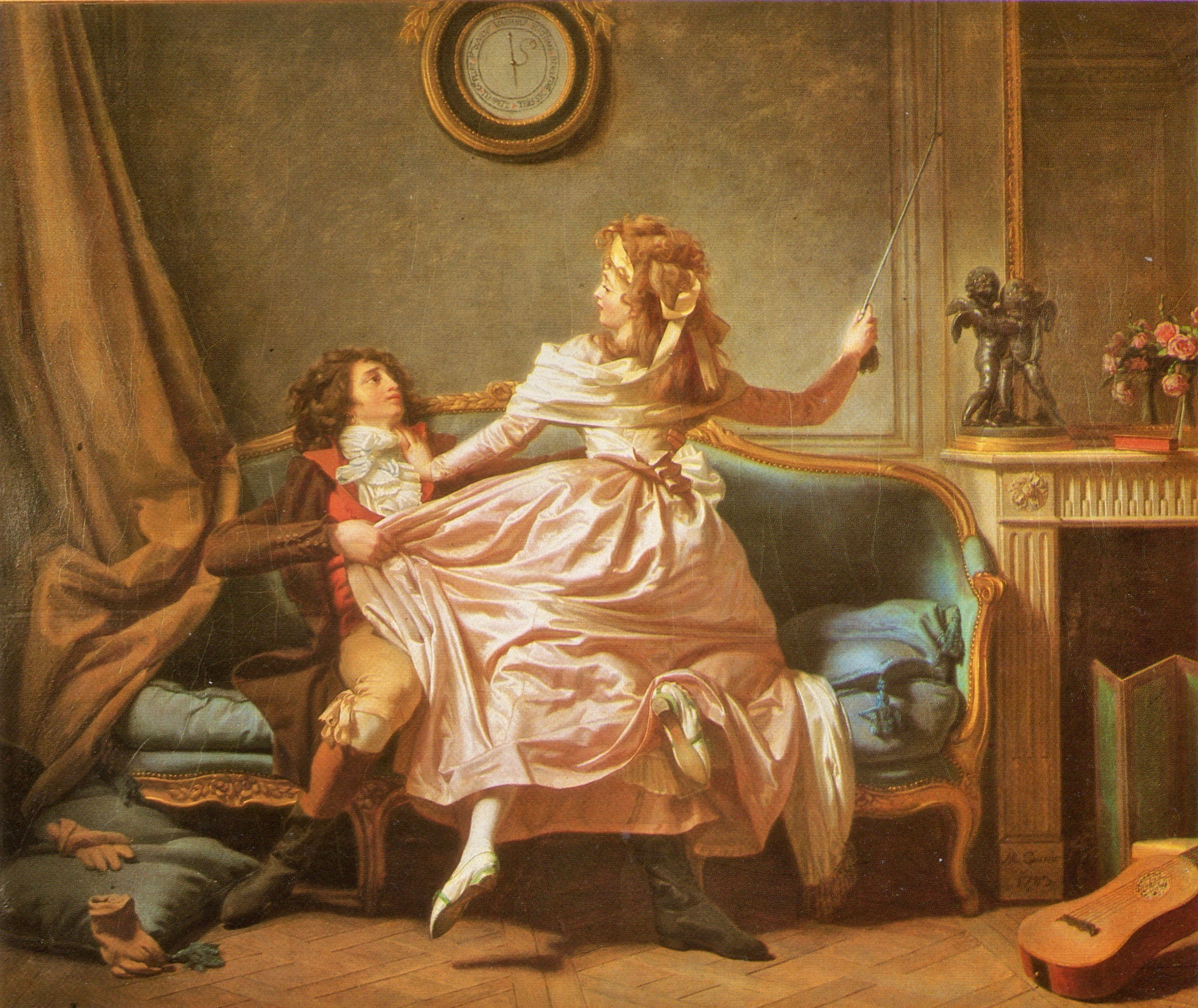 Michel Garnier (1753–1829): Sanfter Widerstand (La douce résistance). Öl auf Leinwand, 55 x 45 cm. (Ehemals) Sammlung Didier Aaron.